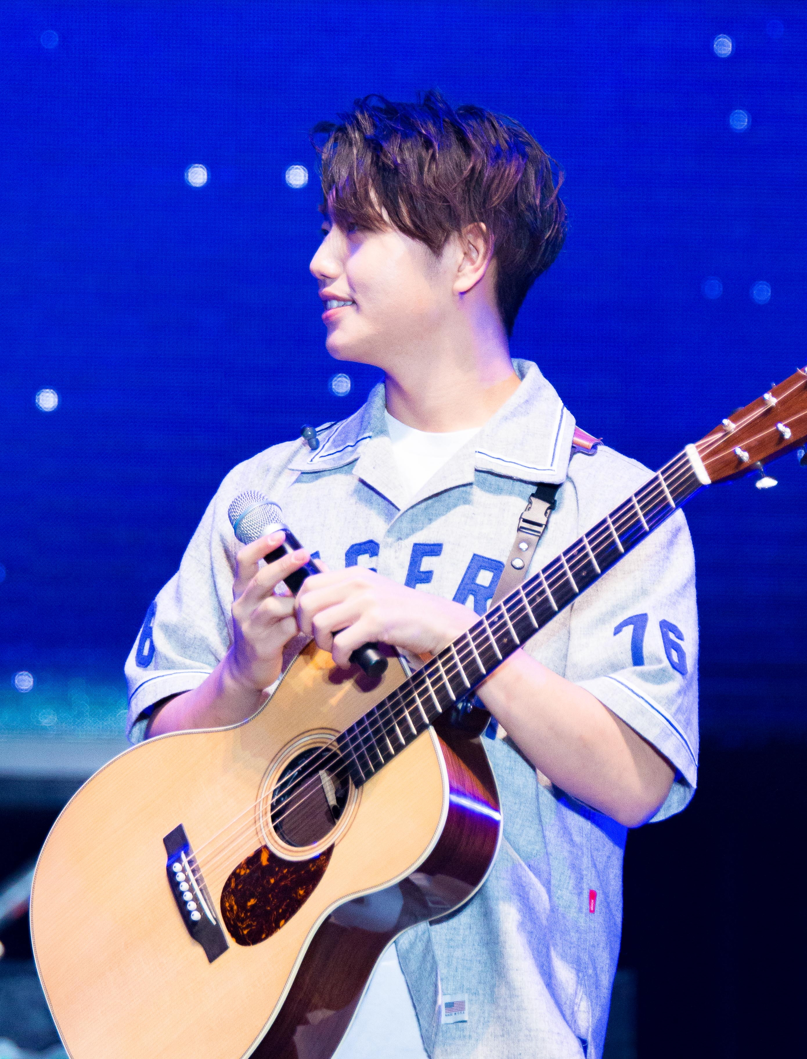 20161009 샘김 김창렬의 올드스쿨 공개방송